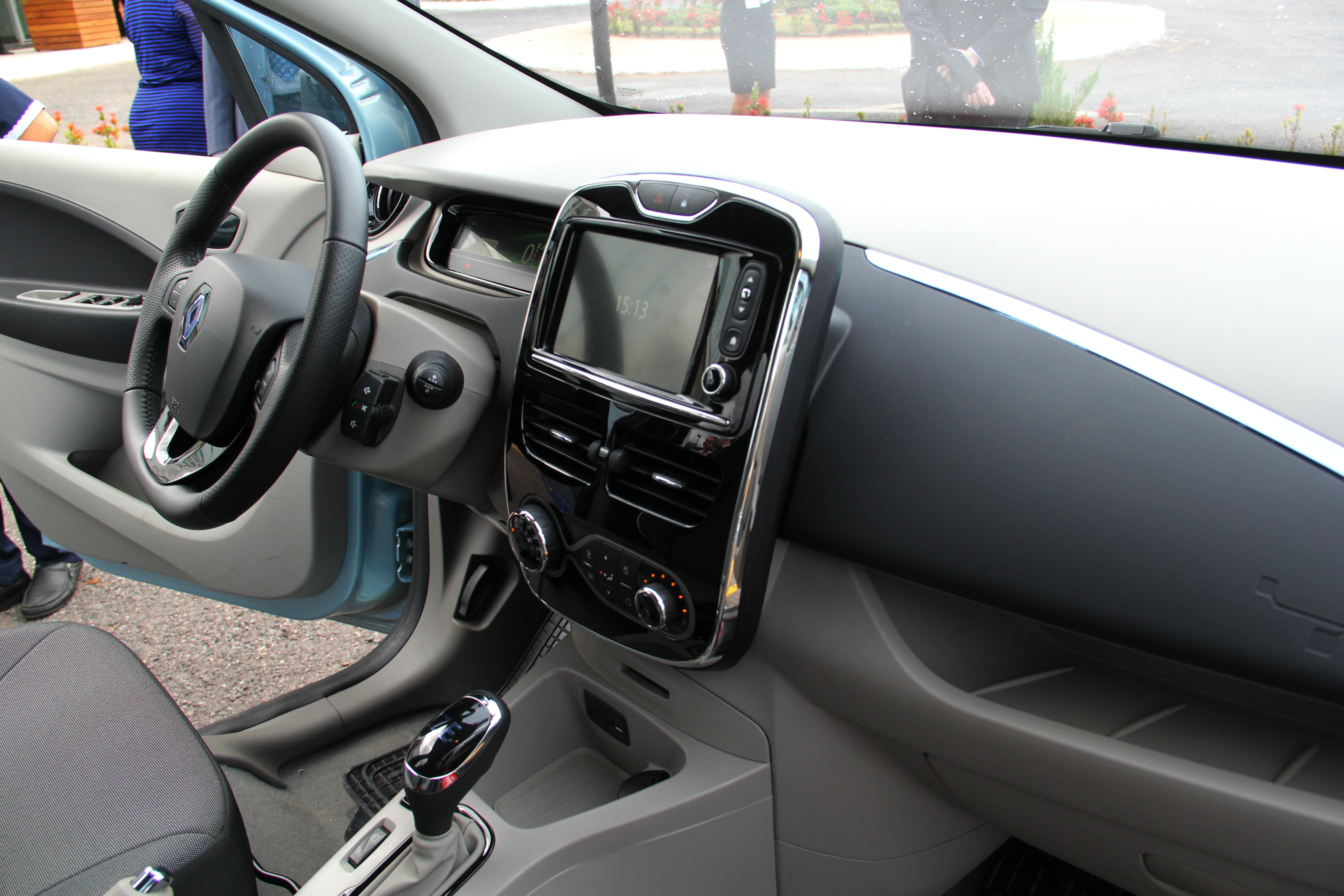 Foto: Bárbara de Oliveira/PNUD Brasil.